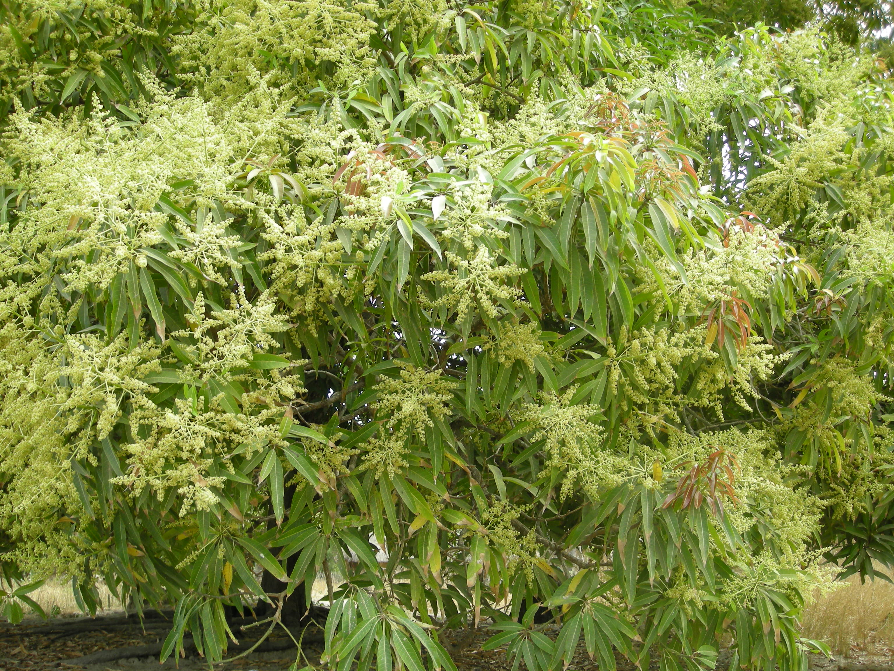 Manguier (détail) à Séléki (Casamance, Sénégal)